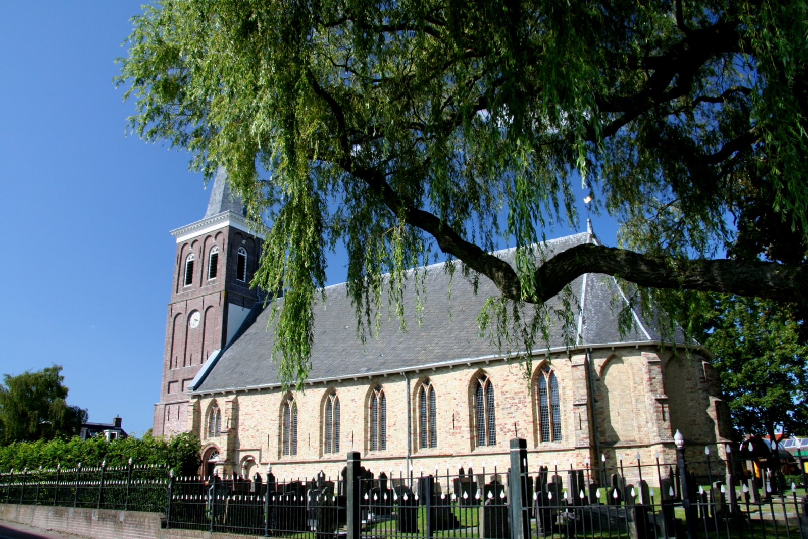 Kerk in Wommels